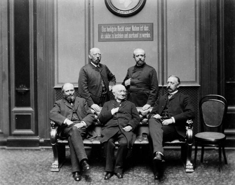 Mitglieder des Deutschen Reichstages 1. Reihe -sitzend- :Freiherr Langwerth v. Simmern, Dr. Windthorst (Mitte) , Baron v. Arnswaldt-Hardenbostel 2. Reihe - stehend: Baron v. Arnswaldt-Böhme, v.d. Decken [Unter der Medaillon P. Pfizer mit Inschrift "Das heiligste Recht einer Nation ist das, als solche zu bestehen und anerkannt zu werden." Aufnahme aus Fotoalbum der "Deutsche Reichstag und sein Heim"] Abgebildete Personen: Langwerth von Simmern, Heinrich von Freiherr: Reichstagsabgeordneter der Deutsch-Hannoverschen Partei Windthorst, Ludwig Dr.: Justizminister des Königreichs Hannover, Reichstagsabgeordneter (MdR), Rechtsberater und Bevollmächtigter König Georgs V., Deutschland (GND 118633678)